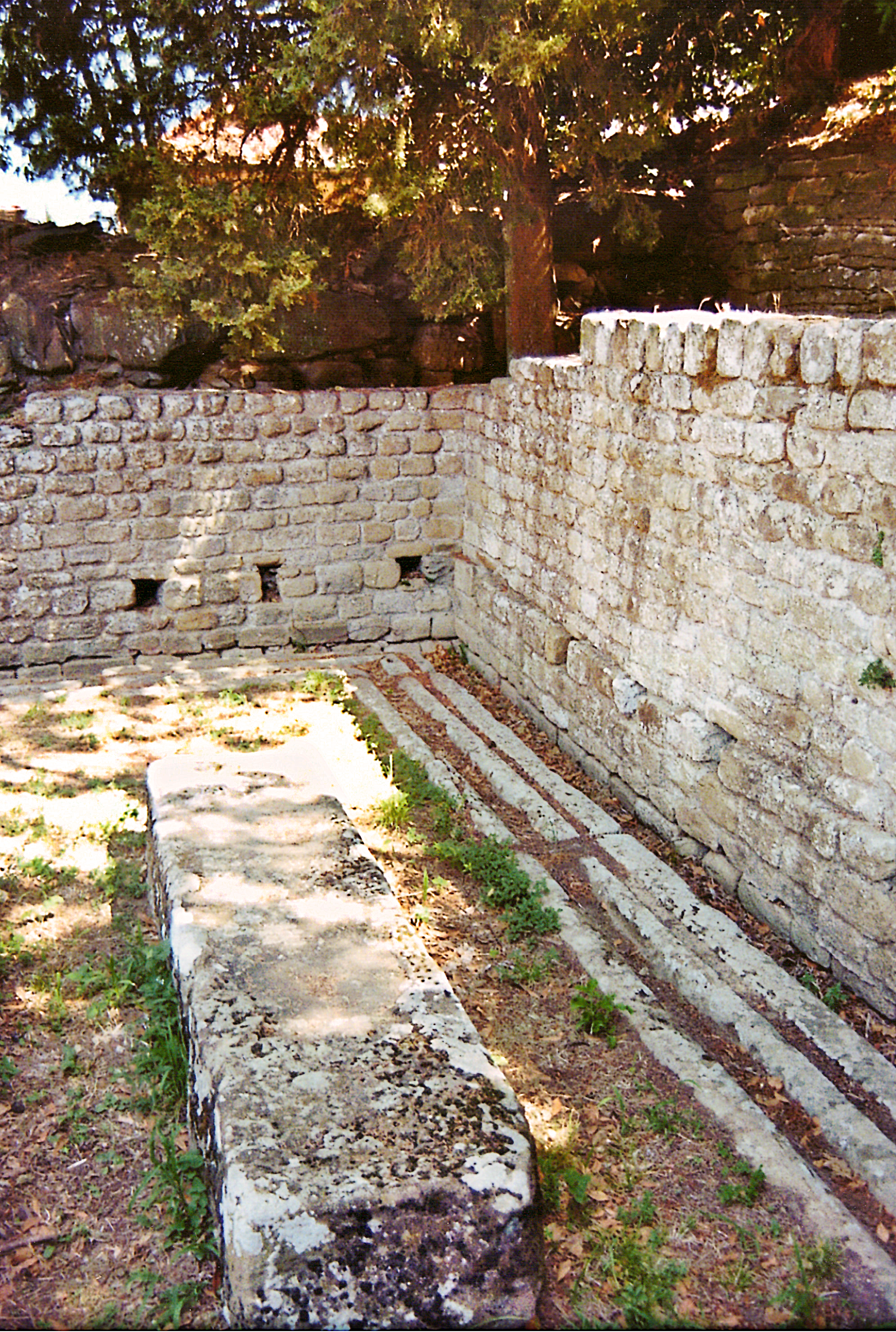 Fiesole (Toskana, Italien) - Archäologische Zone - Thermen. Blick in die am Frigidarium gelegene Latrine.